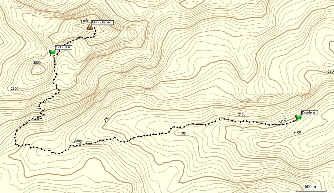 Visualizzazione della salita al Mont Glacier partendo da Dondena e passando per il Col Fussi - Alpi Graie - Valle d'Aosta - Italia